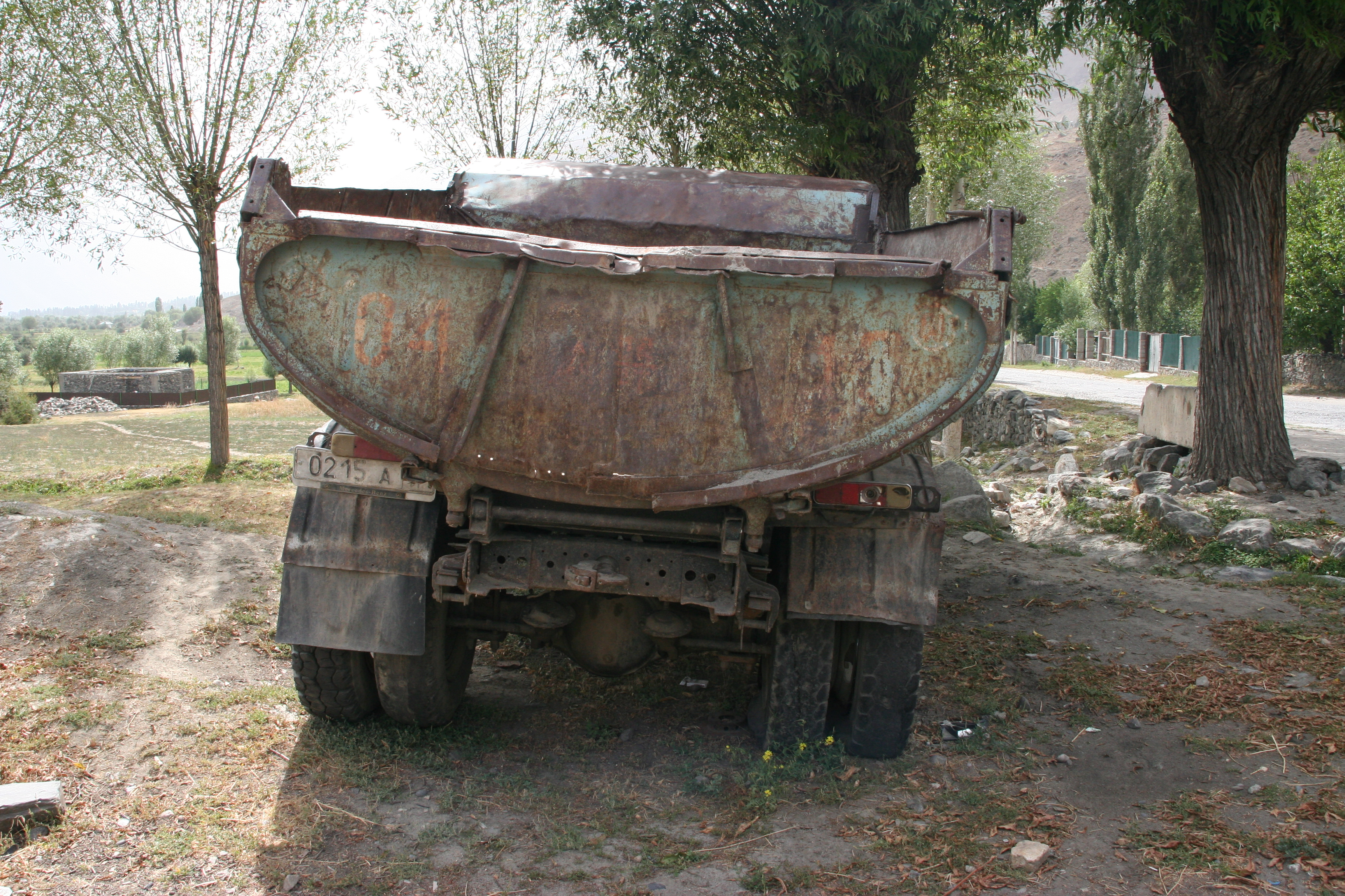 Ein ZIL-MMZ-555 in Tadschikistan nahe der afghanischen Grenze.